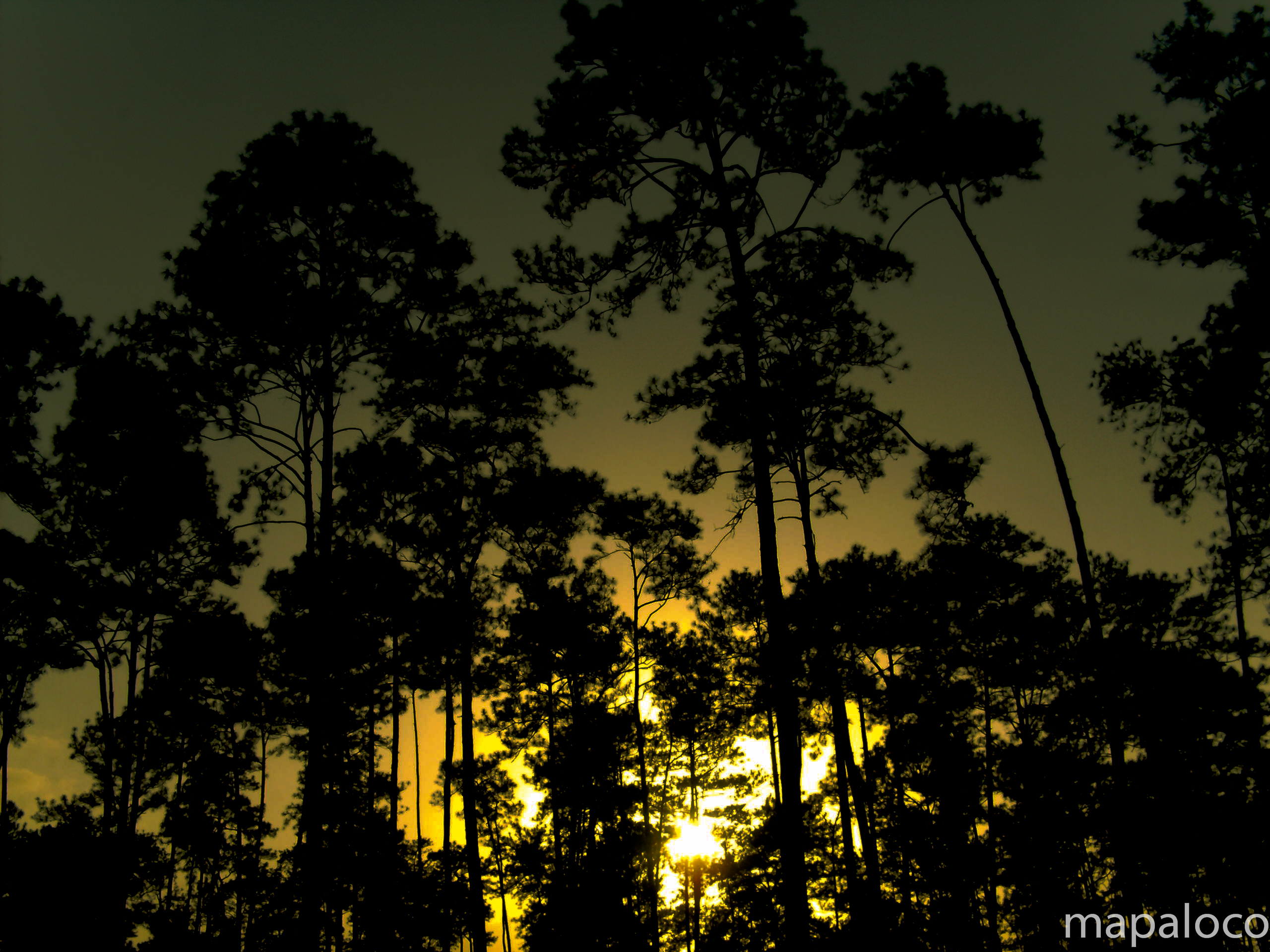 Pinus hondurensis, Región Autónoma de la Costa Caribe Norte, Nicaragua